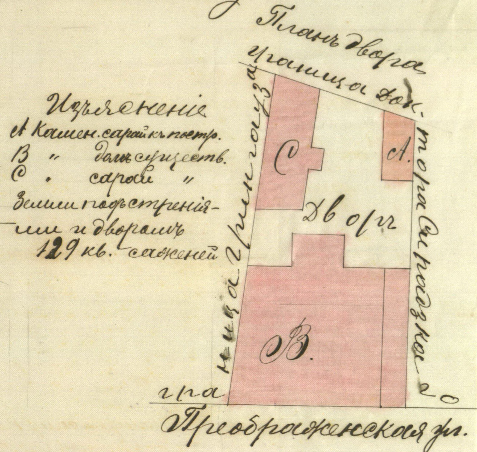 План сядзібы дома №12.Канец ХІХ ст.